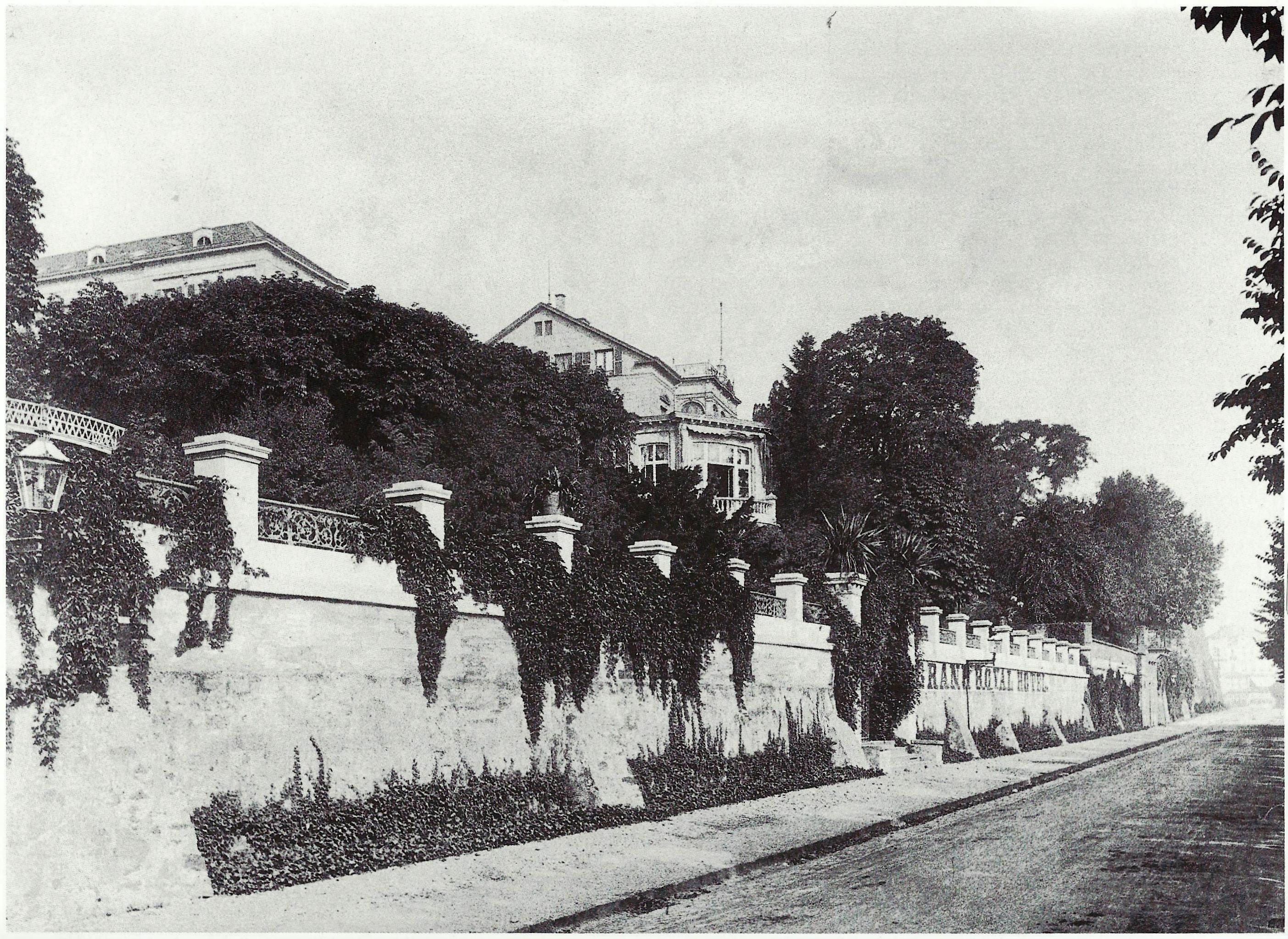 Villa Blume/Obernier (erbaut 1849–51, im Zweiten Weltkrieg zerstört), Coblenzerstraße 9, Bonn: Ansicht vom Rheinufer; links der Gartensaal des Hotels Royal (später Königshof)